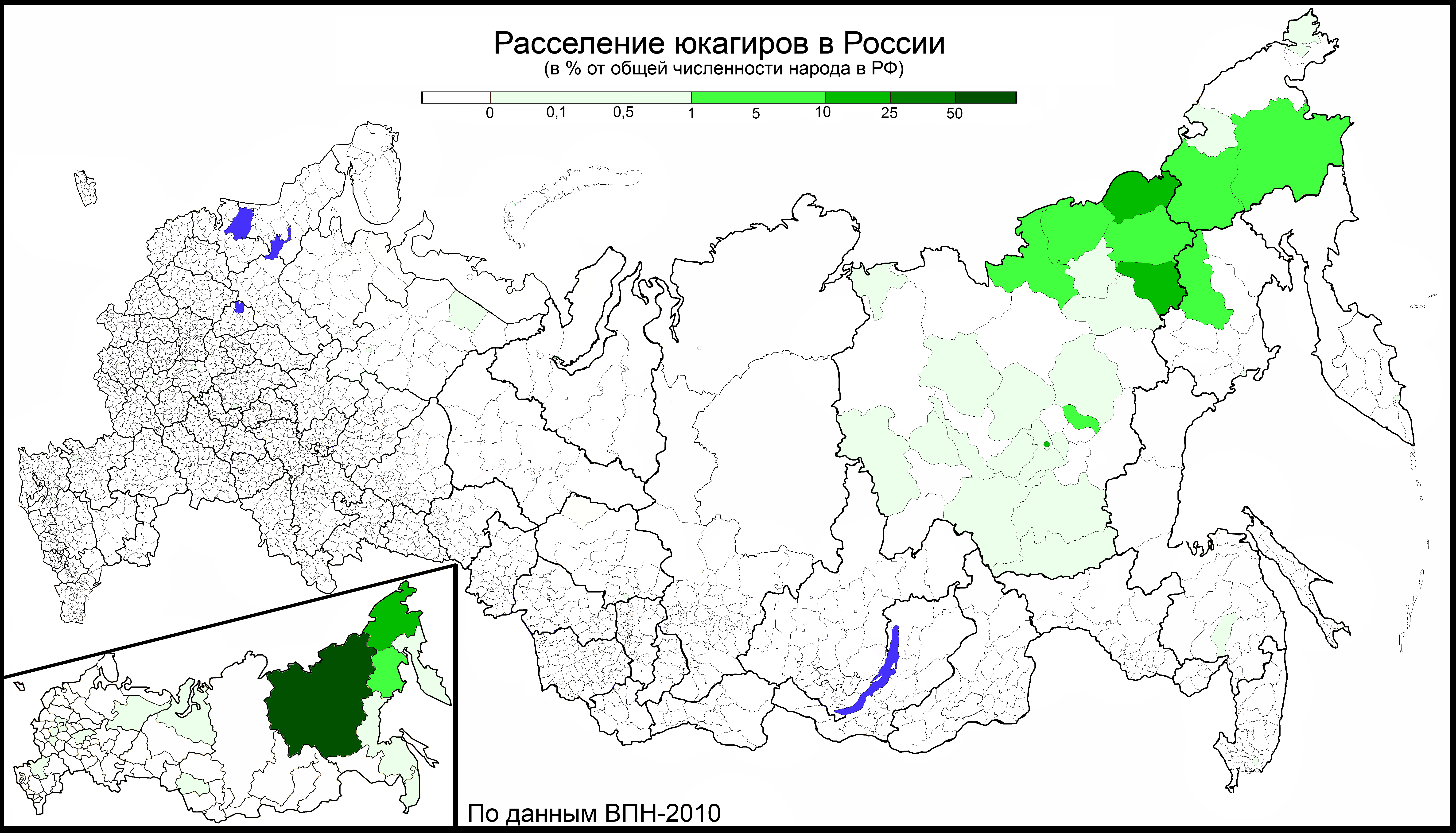 Расселение юкагиров в России по муниципальным районам и городским округам в % от общей численности этого народа в РФ. По переписи 2010 года